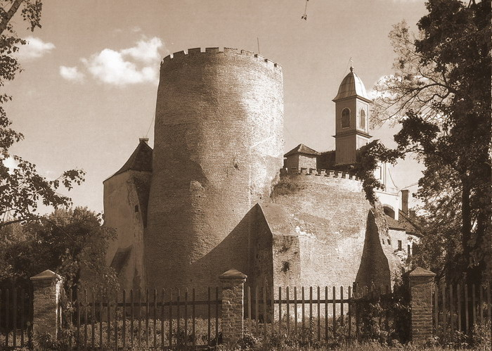 Pogled na srednjovjekovnu kulu i zidine dvorca u Valpovu iz vanjskog opkopa